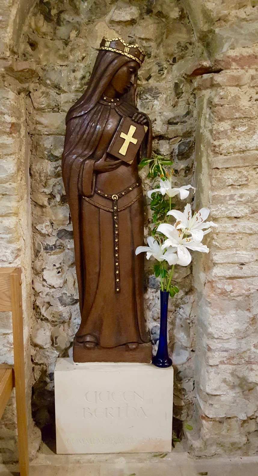 Statua lignea di santa Berta, fotografata nella Chiesa di San Martin a Canterbury, immediatamente dopo una funzione religiosa.